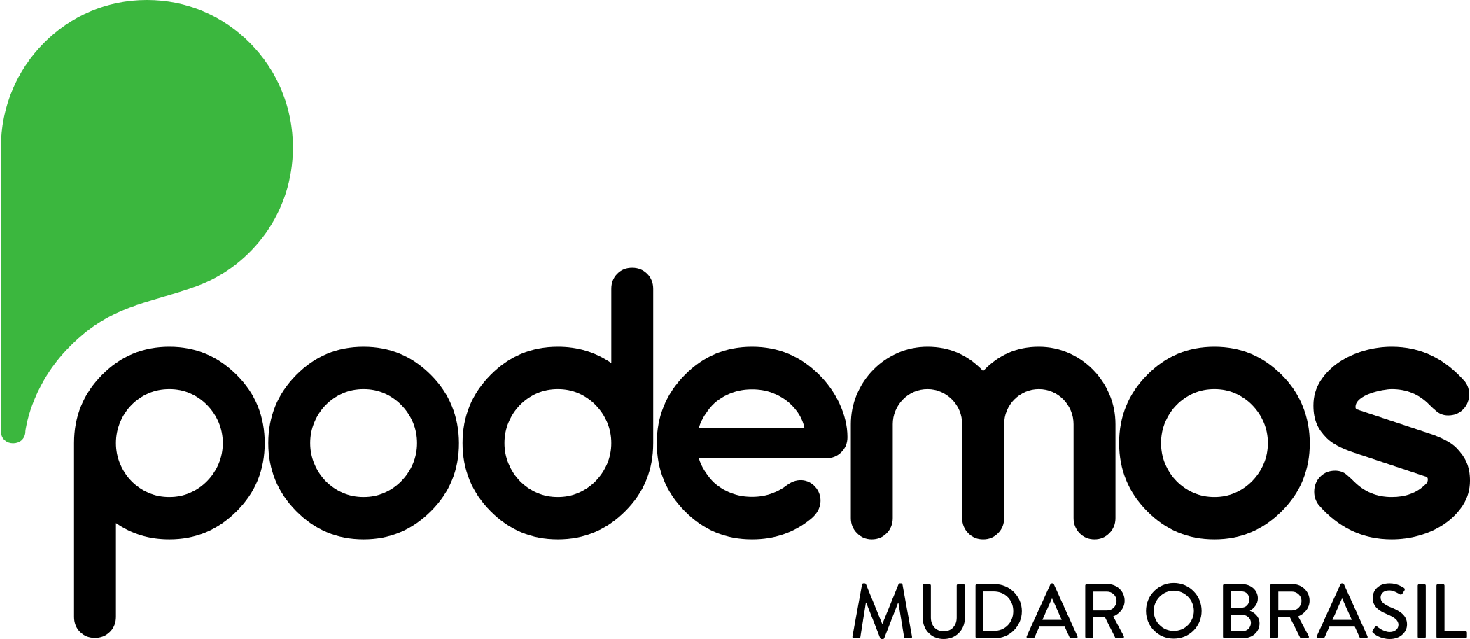 Logotipo do Partido PODEMOS